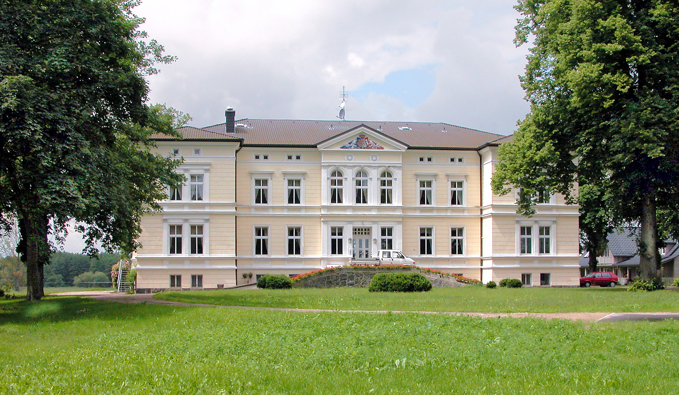 28.06.2004 17111 Vanselow (Siedenbrünzow), Vanselow 16 (GMP: 53.878627,13.168344): Spätklassizistisches Herrenhaus, erbaut 1870-1872 unter Hans Ludwig von Maltzahn nach Plänen von Georg Daniel. Nach dem II. Weltkrieg enteignet. In der DDR Mietswohnhaus. 1990 Rückerwerb durch Mortimer Freiherr von Maltzahn. Nach Sanierung war das Haus bis 2003 "Hotel Schloss Vanselow". Danach Wohnsitz der Familie von Maltzahn. Sicht von Südosten. [DSCN4404.JPG]20040628200DR.JPG(c)Blobelt